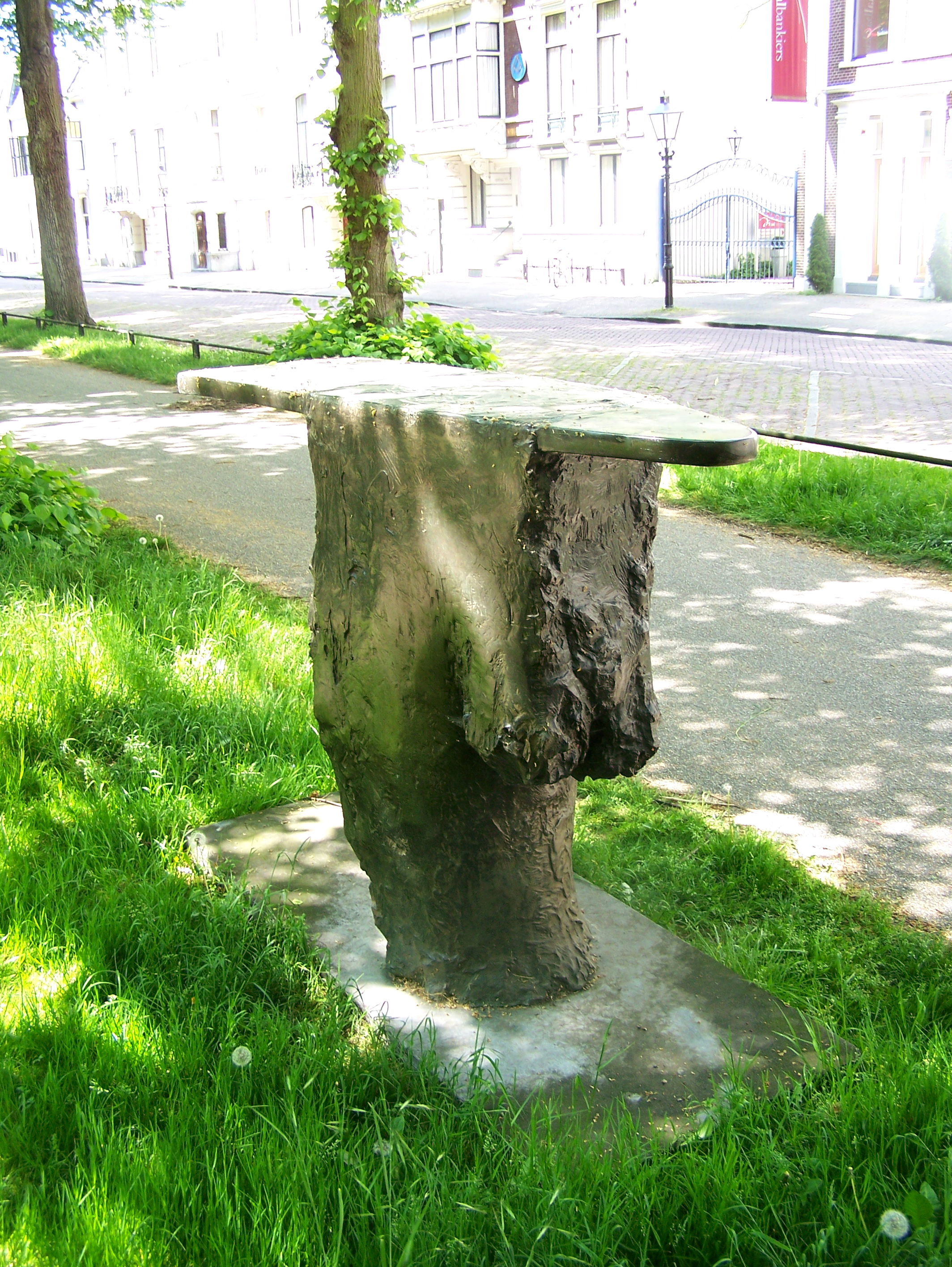 Sculpture "Strijkplank" (Ironing board) by Jorien Rooymans-de Kruyff van Dorssen (1983). Placed at the Maliebaan in Utrecht.